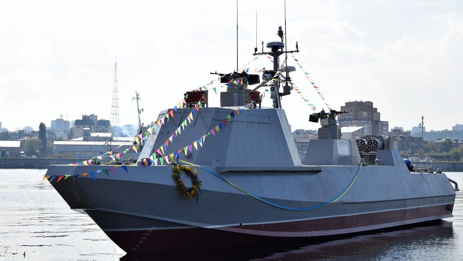 — В умовах нарощування військово-морської присутності Російської Федерації, зокрема в Азовському морі, особливо гострою для нас є потреба в малих, високо маневрених та добре оснащених кораблях та катерах, — наголосив командувач Військово-Морських Сил ЗС України адмірал Ігор Воронченко. — Спуск на воду нових бойових одиниць для Військово-Морських Сил ЗС України поступово стає вже буденною плановою подією, — додав він. Керівник виду ЗС України зазначив, що в найближчій перспективі від національної промисловості для українських ВМС очікуються сучасні ракетні катери, які будуть здатні нести новітню ракетну зброю українського виробництва, що дозволить наростити сили оборони України з морського напрямку. За флотською традицією, під час спуску корабля на воду об борт була розбита пляшка шампанського. Хрещеною матір’ю катера стала Народний депутат України Ірина Фріз. Музичний супровід заходу здійснював військовий оркестр українських ВМС. Представник духовенства отець Михаїл освятив катер і екіпаж. Командиром першого десантно-штурмового катера стане старший лейтенант Сергій Одинець. Офіцер Військово-Морських Сил ЗС України в 2014 році, будучи курсантом III-го курсу Академії ВМС ім. П.С. Нахімова, не зрадив Військовій присязі на вірність Українському народові, вийшов на материкову Україну й продовжив навчання у військово-морському навчальному закладі. Після випуску продовжив службу в бригаді надводних кораблів національного флоту.